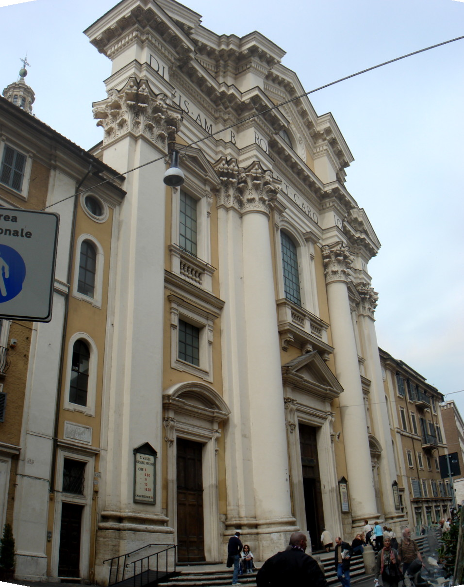 Roma, via del Corso: Basilica dei santi Ambrogio e Carlo (rione Campo Marzio). La facciata, costruita nel 1684 su progetto del cardinale Luigi Alessandro Omodei.